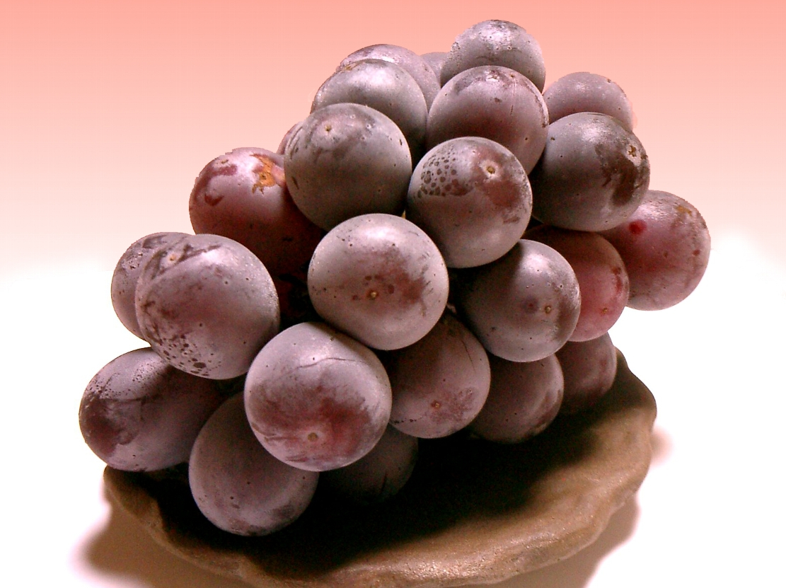 kyoho(grape)